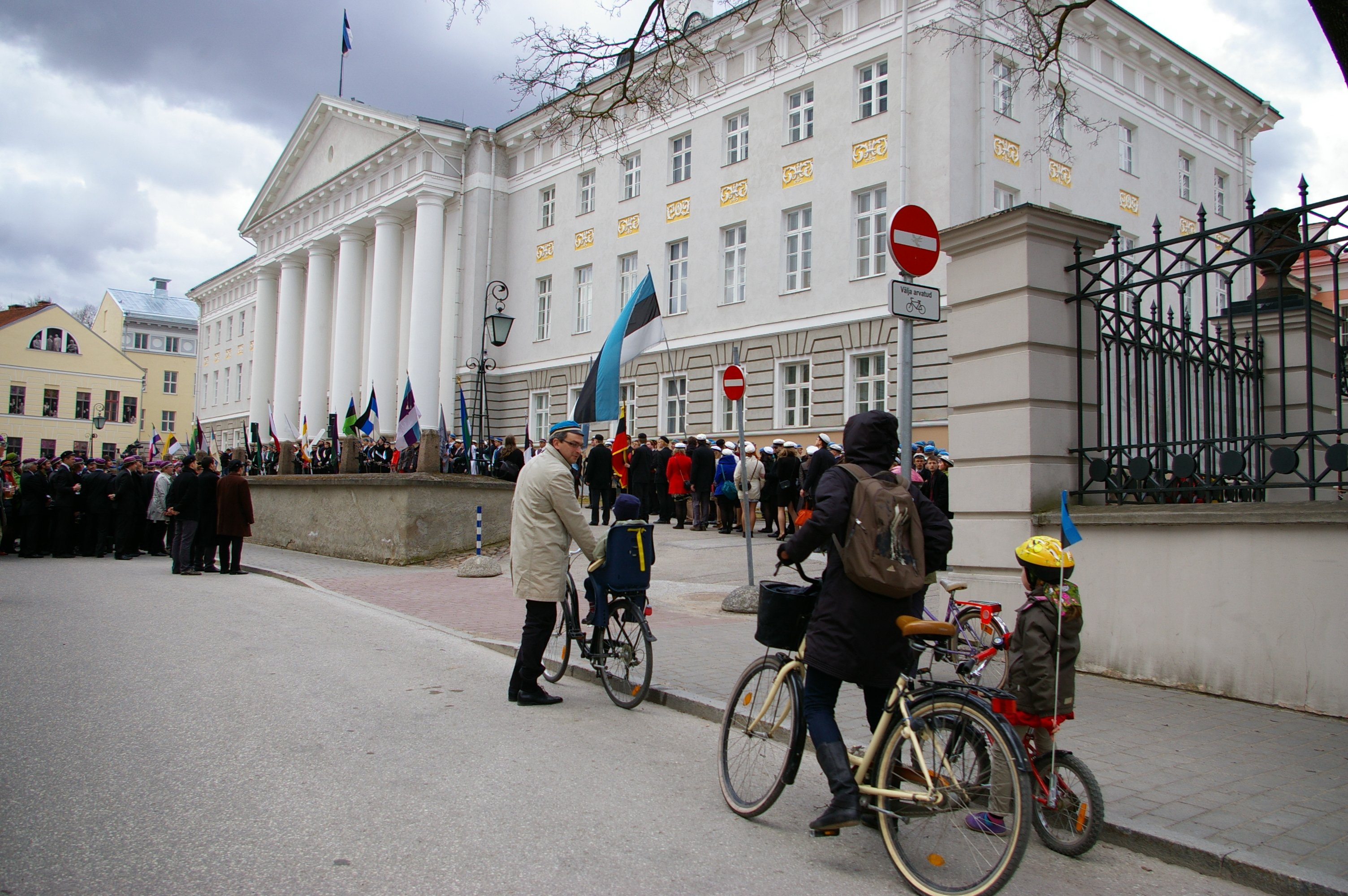 Peahoone ees rektori kõnet ootamas